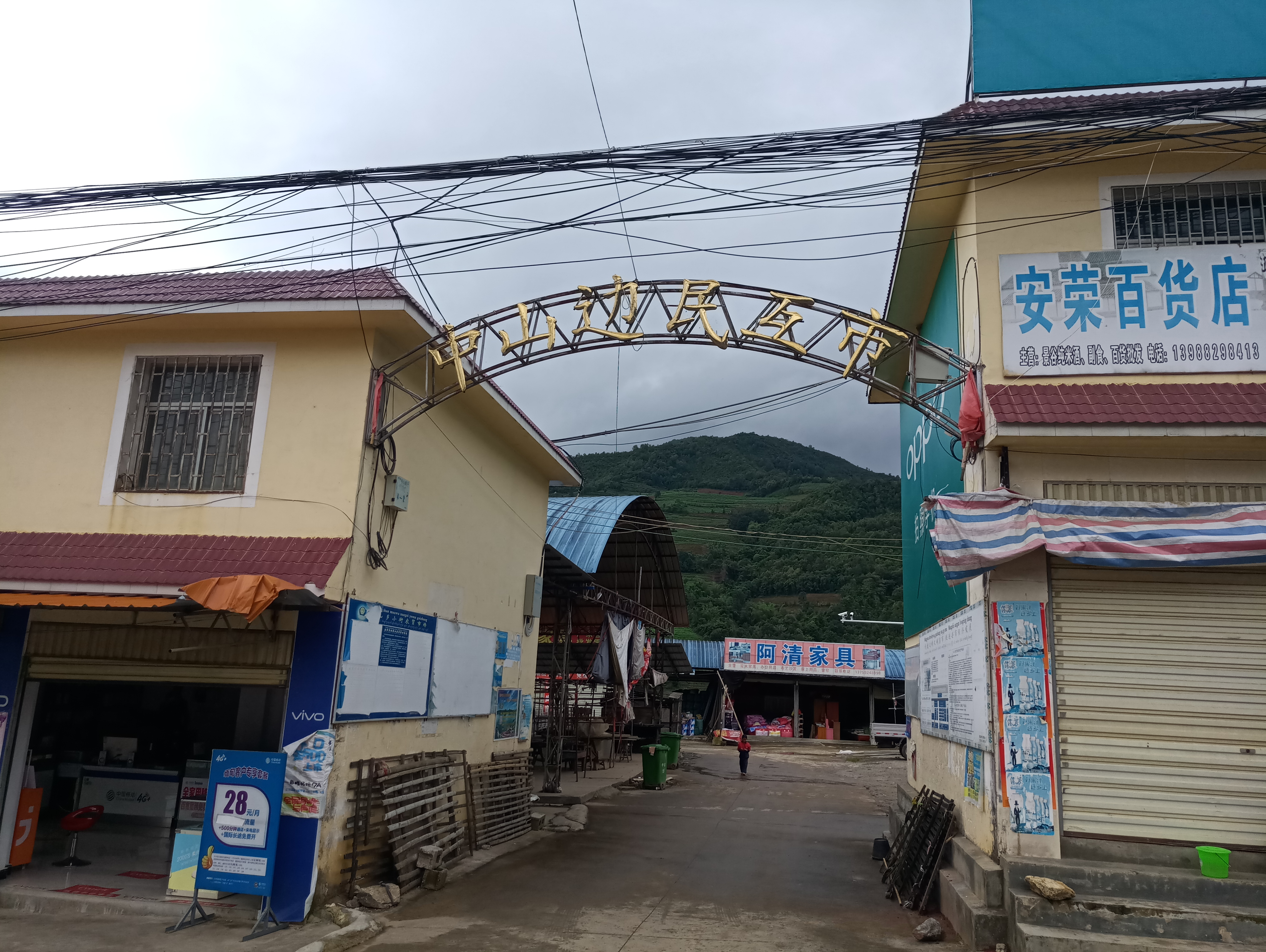 芒市中山边民互市